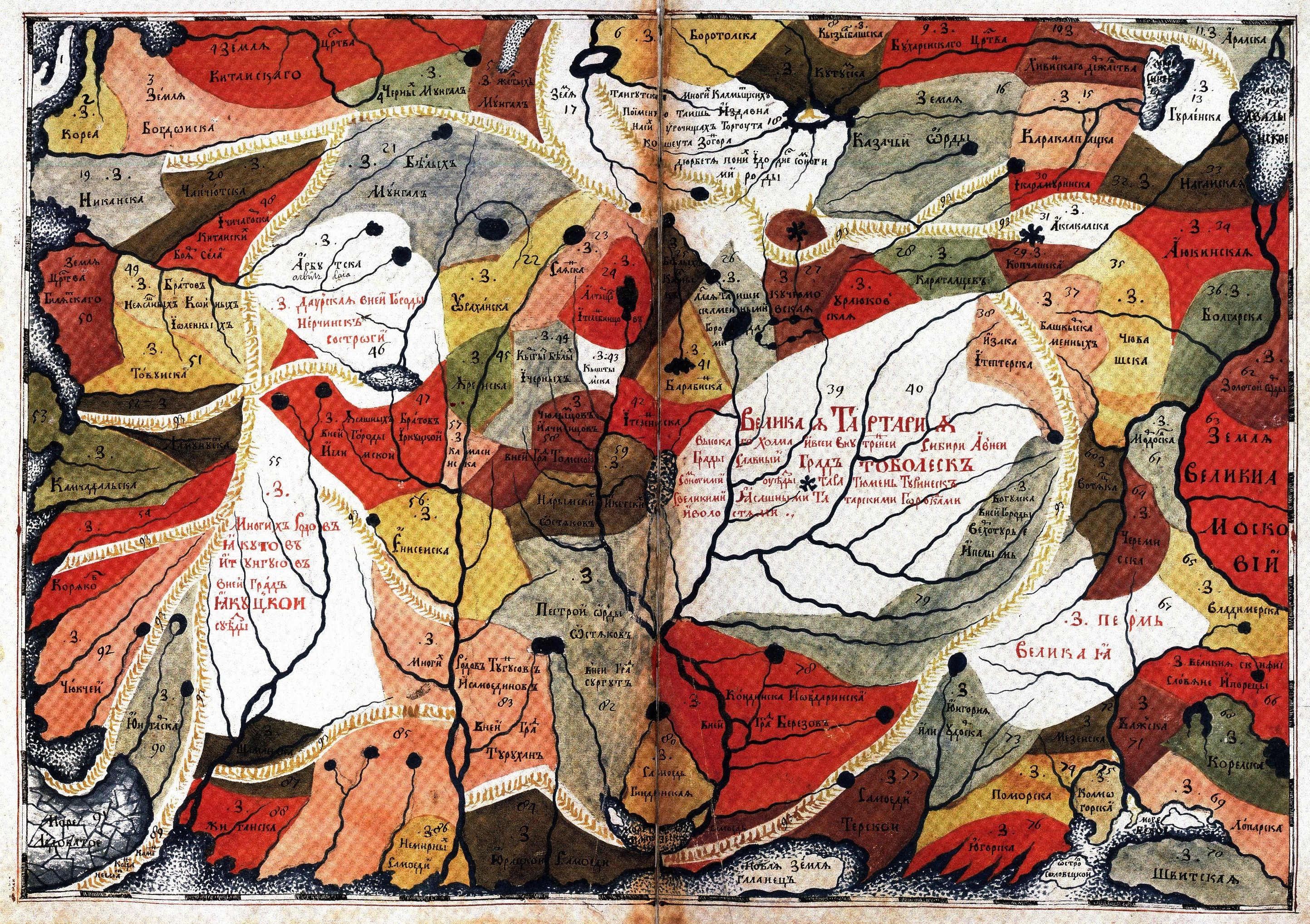 Чертёж расположения земель всей Сибири, Тобольска и всех других городов, населённых мест и степей. Лист 23 (карта)